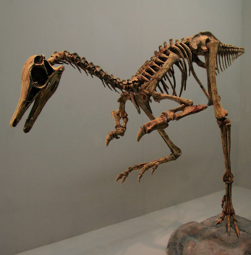 Patagonychus - 01